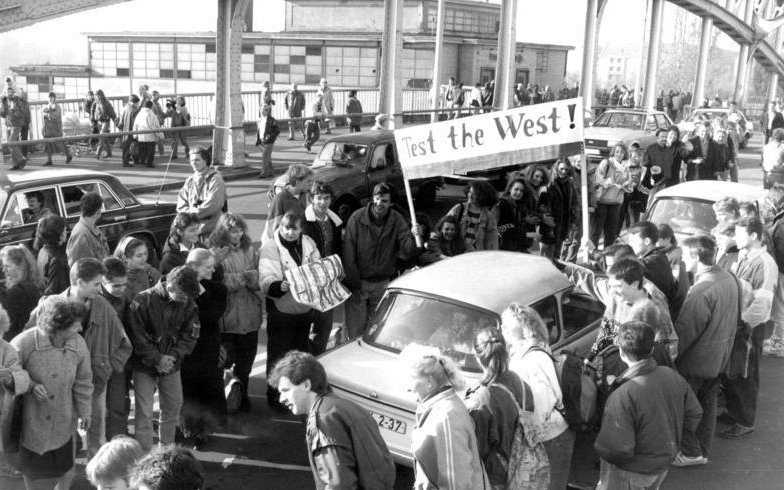 ADN-ZB-Lochmann-10.11.89-Berlin: Grenze-Schüler aus dem Westberliner Stadtteil Wedding bildeten auf der Böse-Brücke an der Bornholmer Straße Spalier und bereiteten den Besuchern aus der DDR einen ersten Empfang.